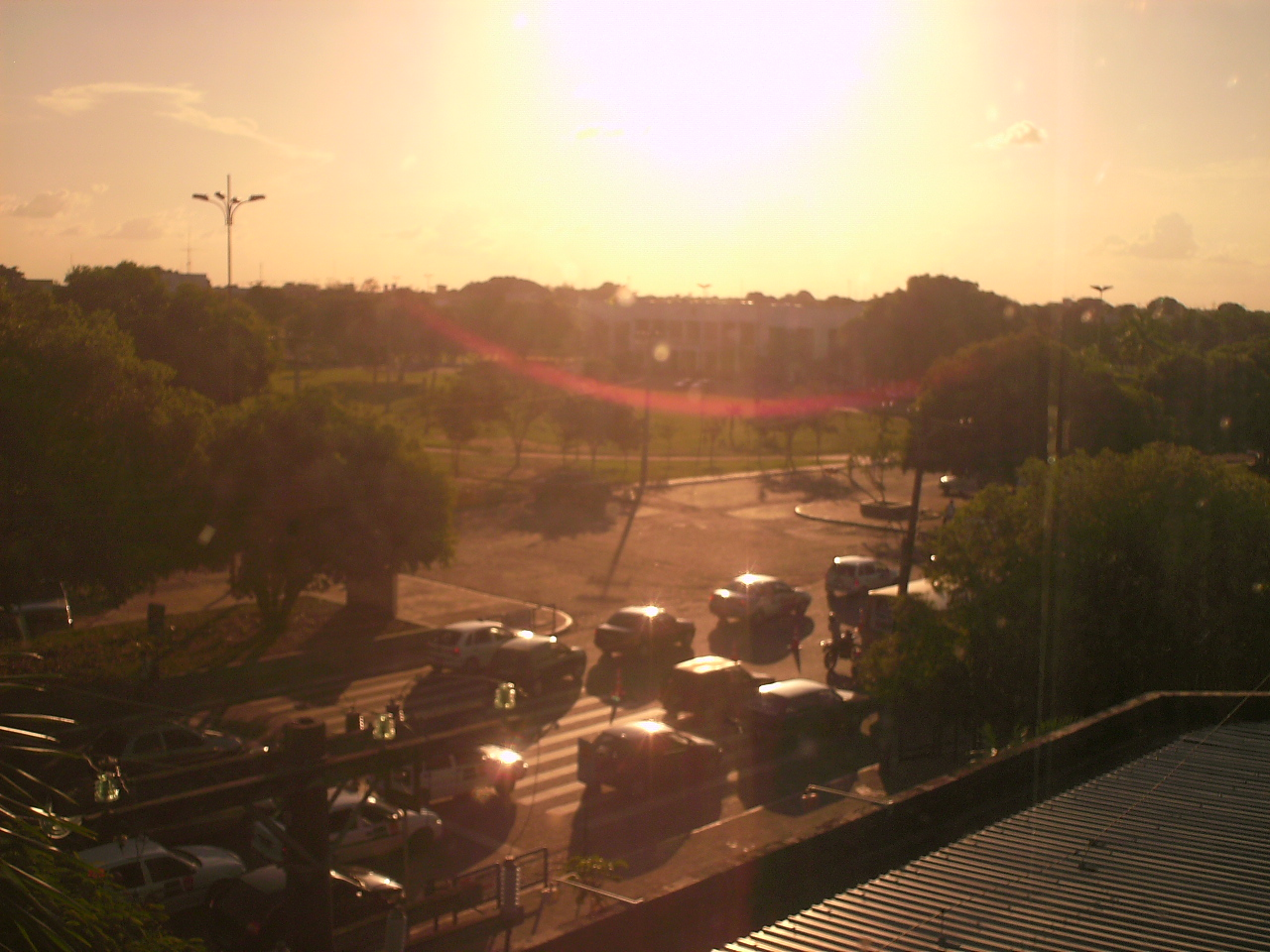 Boa Vista